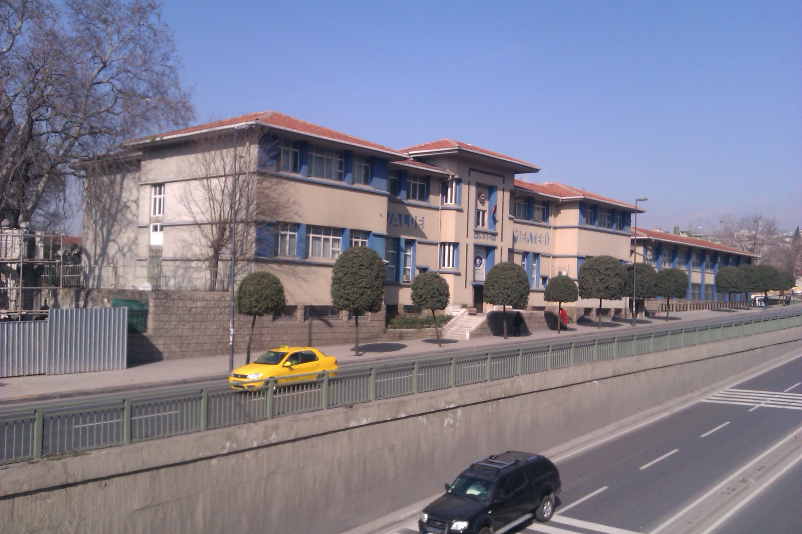 Pertevniyal Valide Sultan Okulu